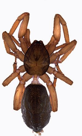 Zelotibia kibira (female)